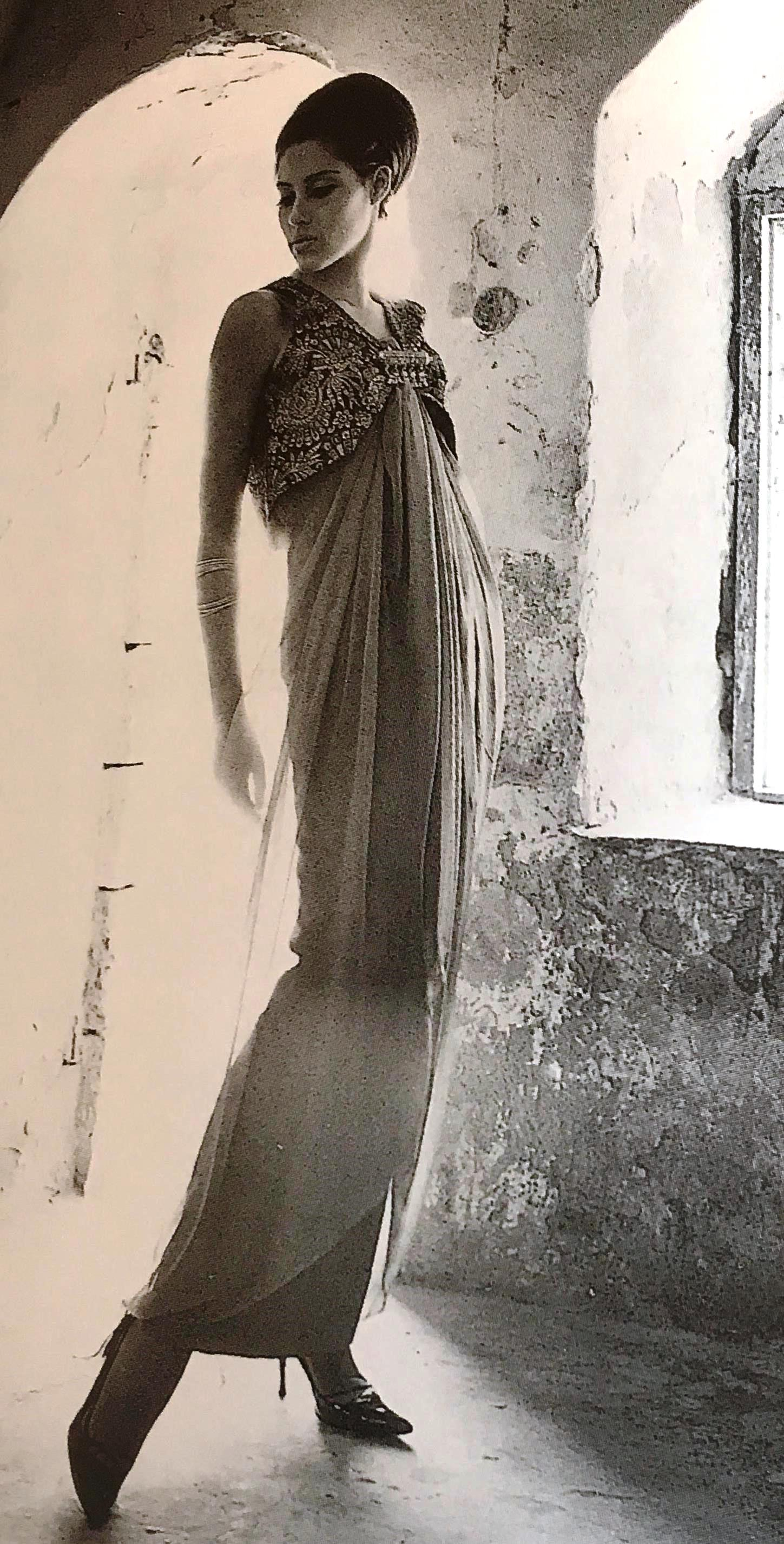 גדעון אוברזון, שמלת ערב